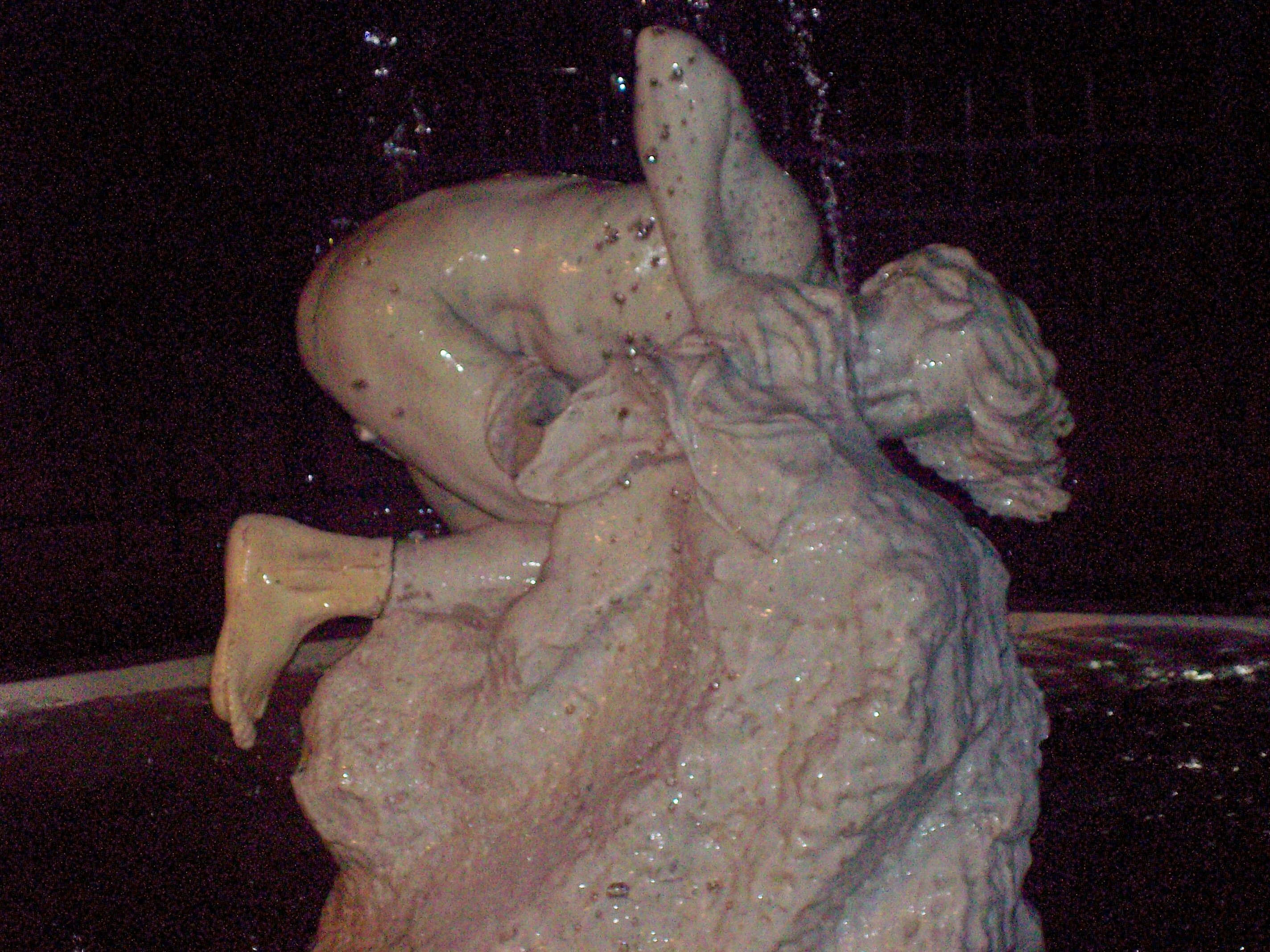 Escultura "El sediento" de Luisa Isabel Isella de Motteau, en la Plaza Rodríguez Peña, en Buenos. Aires, a unos 20 m de Callao, al 950 aprox.